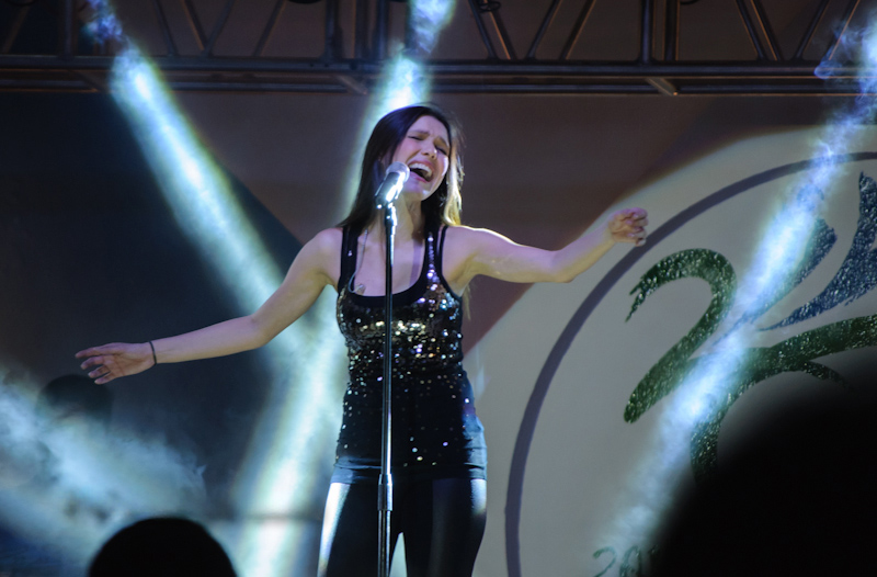 Presentacion en H. Cd. Huajuapan de León, Oax.